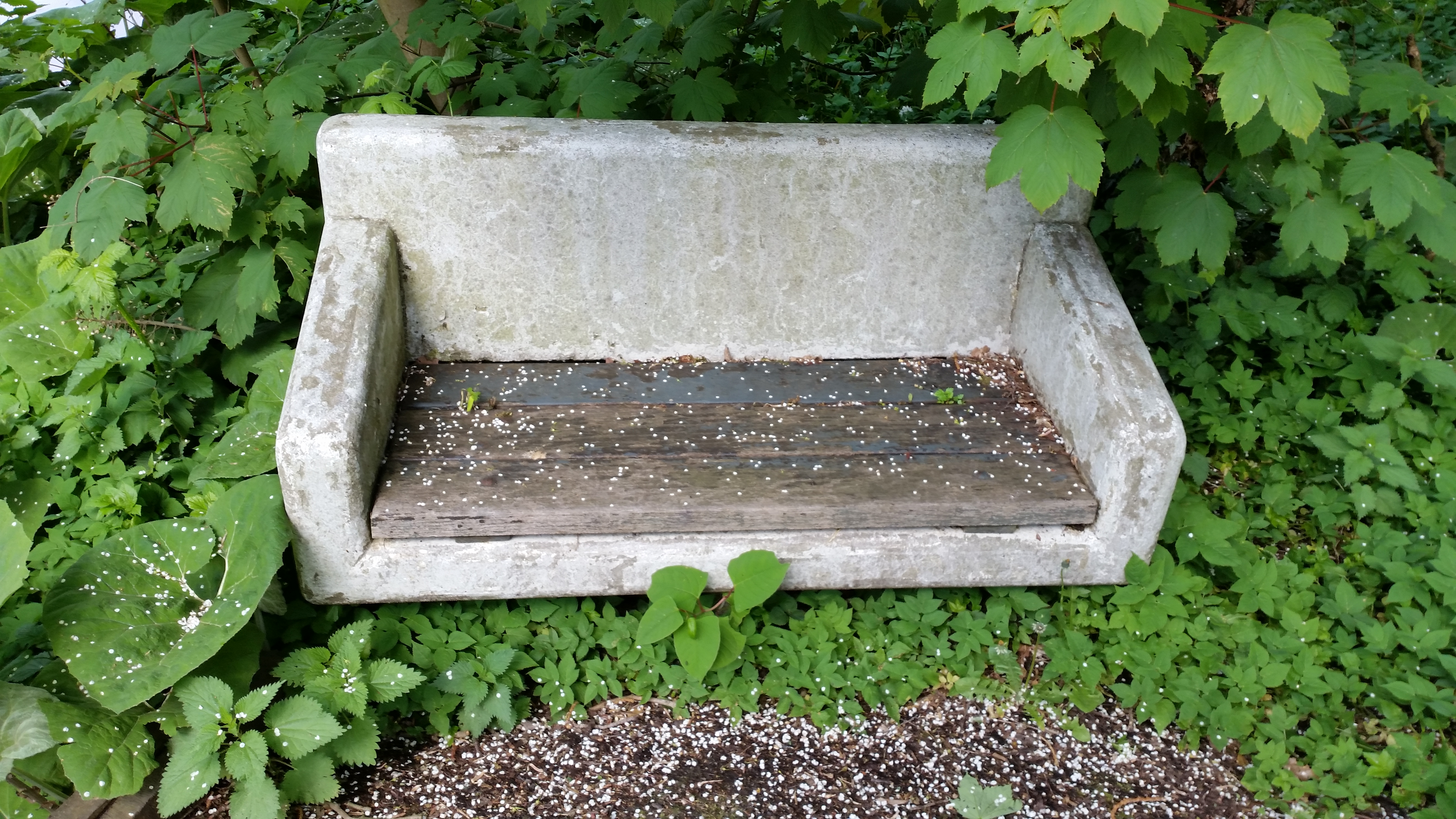 bankje bij Brug 591 (in Amsterdam)